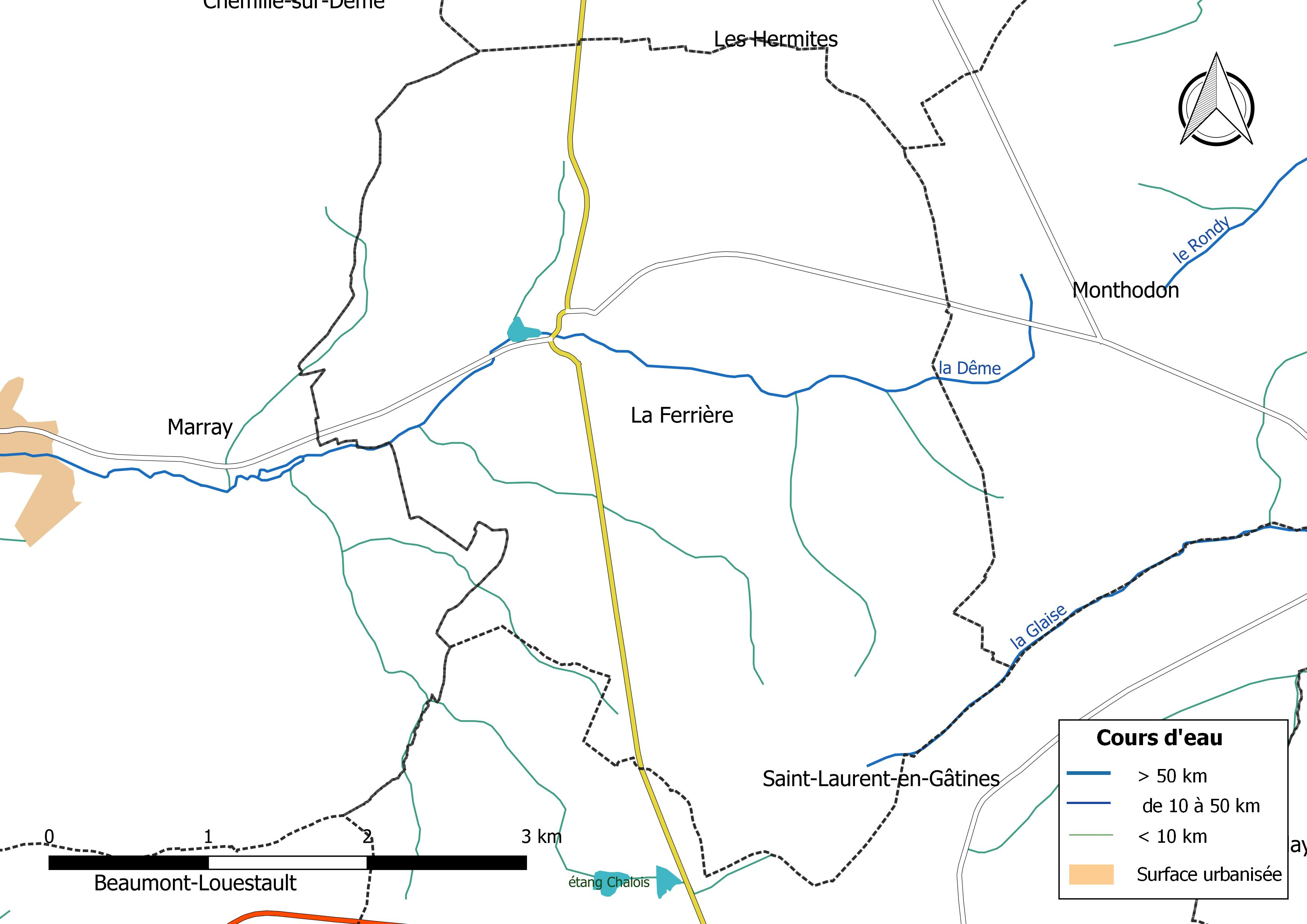 Carte du réseau hydrographique de la commune de La Ferrière (Indre-et-Loire (France).